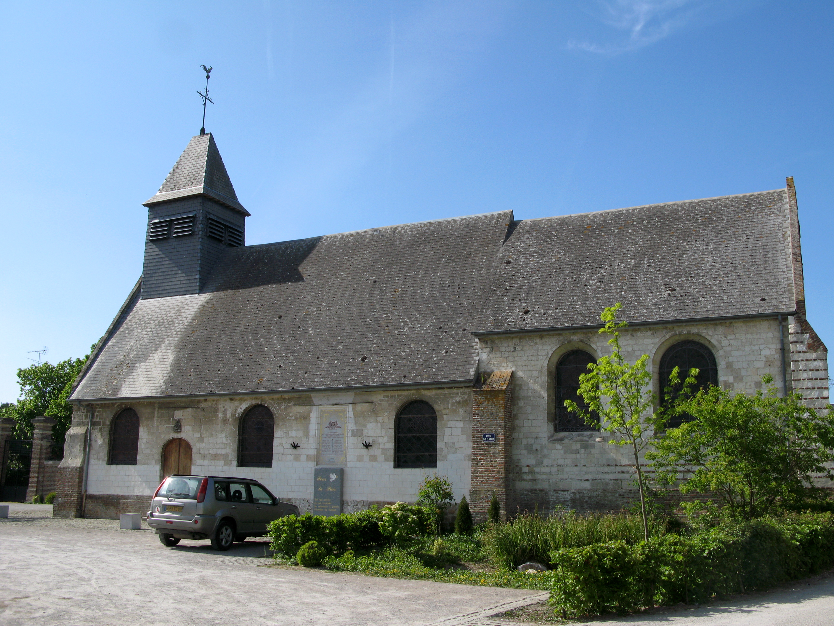 Vaux-en-Amiénois (Somme, France) - L'église. Sur la façade Sud de l'édifice est fixée une plaque mentionnant les « Morts pour la France ».